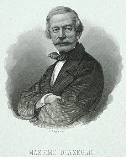 "Ritratto di Massimo D'Azelio" ridotto, litografia